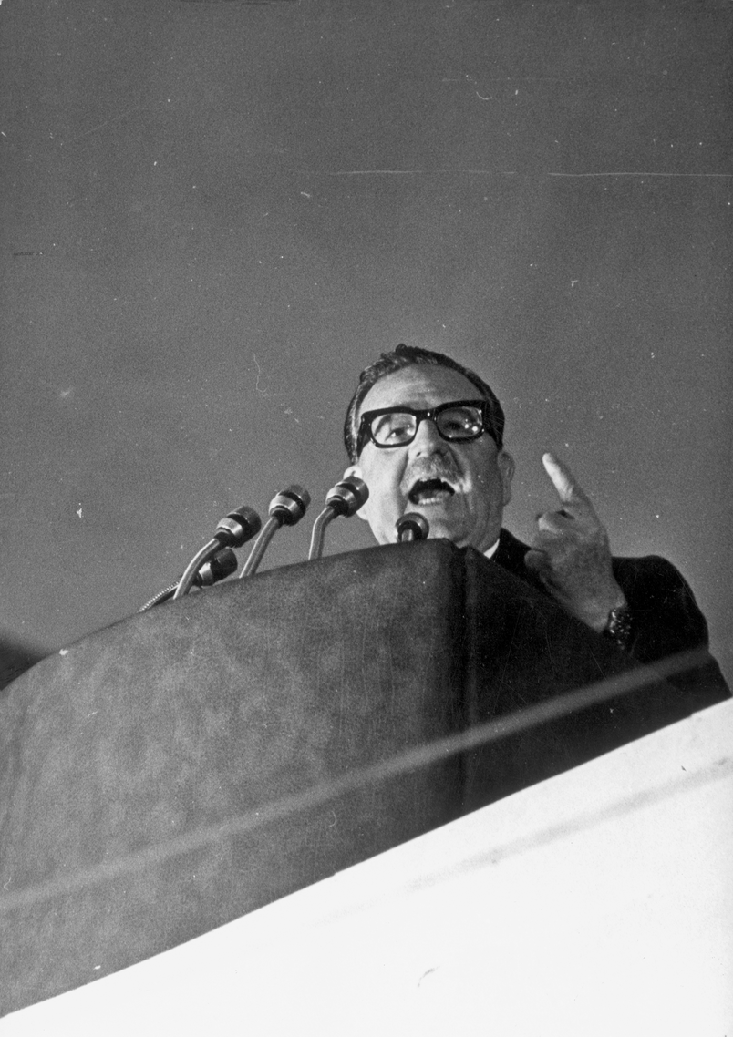 Allende dando su discurso, en las manifestaciones de la U. P.